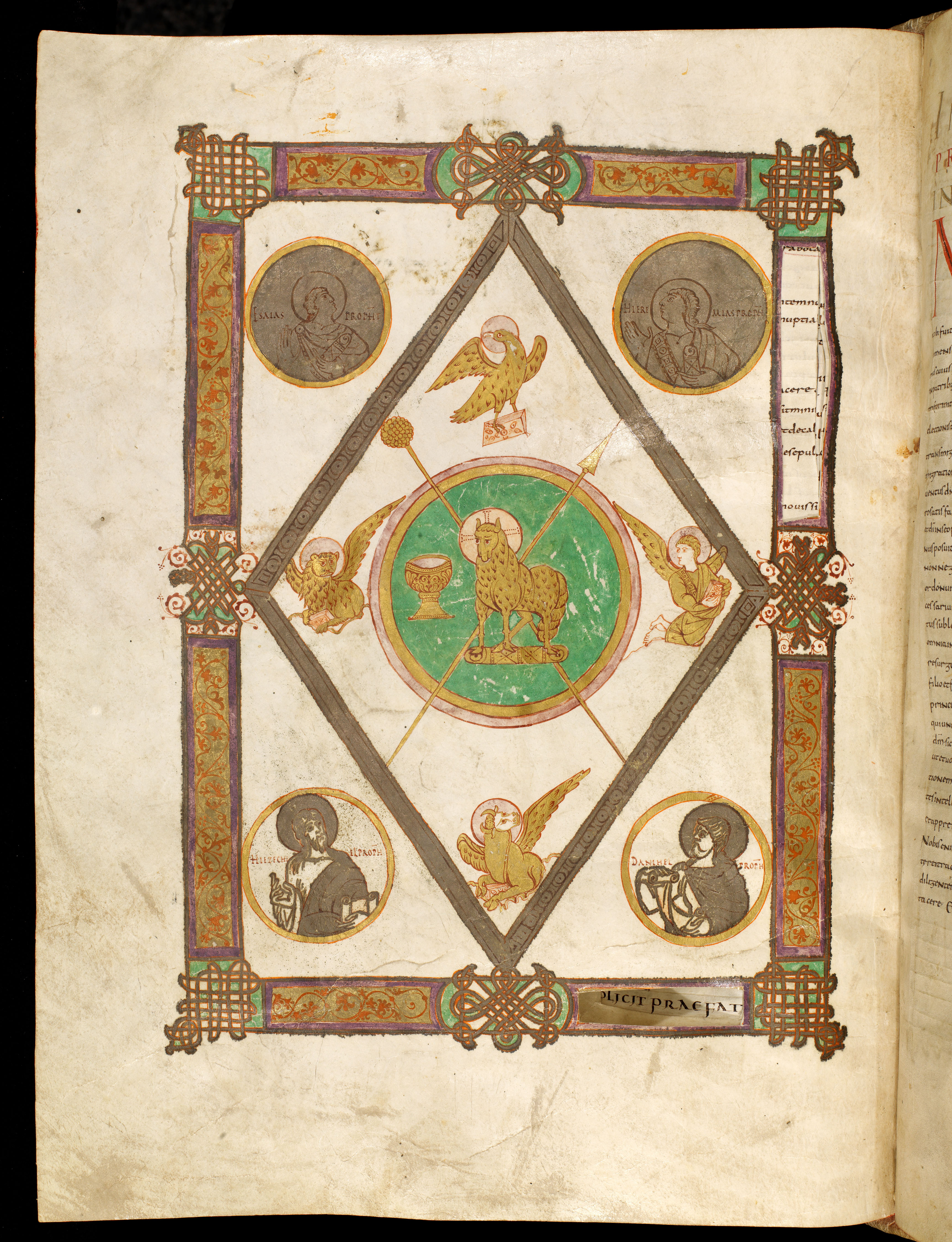 Alkuin-Bibel, Bamberg, Miniatur zum Neuen Testament